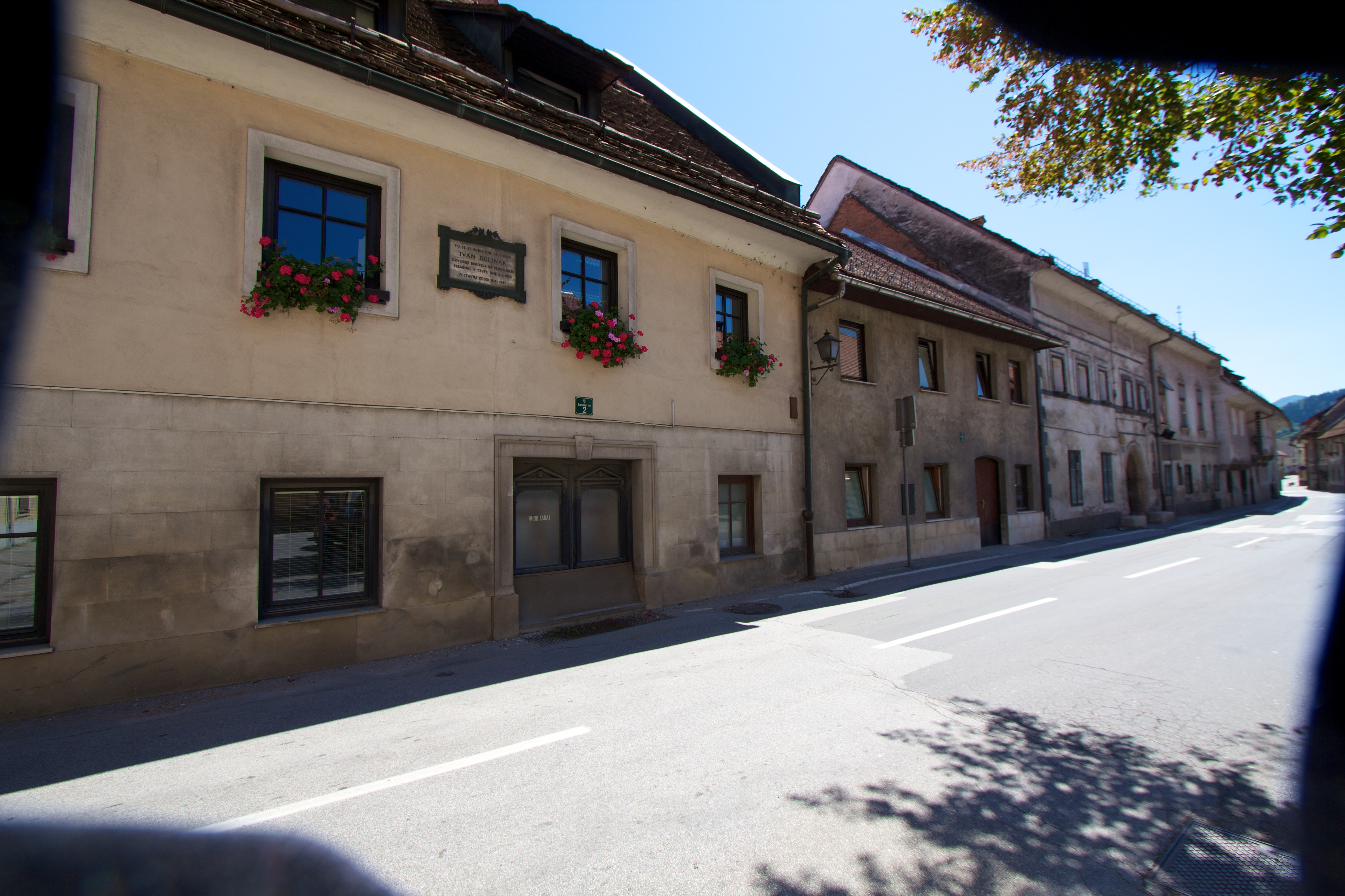 Škofja Loka 002